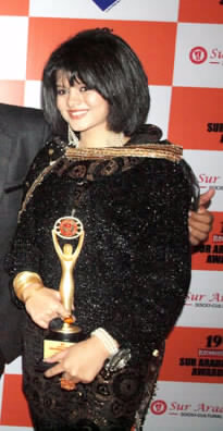 Palak Muchhal at 19th Sur Aradhana Awards